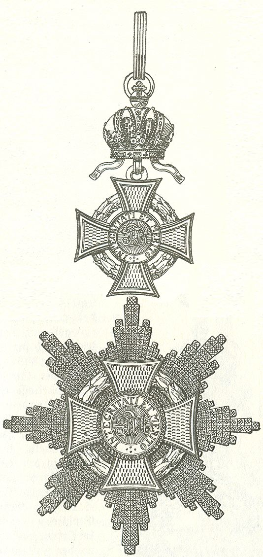 Scan van Blz. 275 van het boek "Handbuch der Ritter- und Verdienstorden " uitgegeven 1893 door Weber.Tekening van de in 1902 overleden Maximilian Gritzner. Robert Prummel 10 jul 2008 16:40 (CEST)